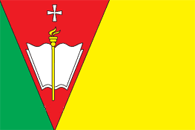 Прапор Рівненського району